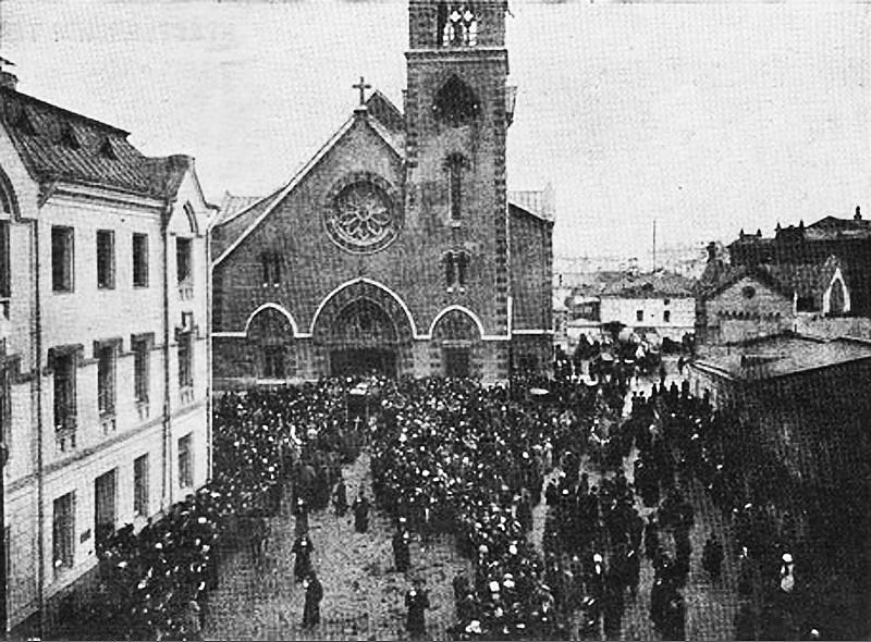 Похороны епископа Генриха Генриховича Дикгофа. Евангелическо-лютеранский кафедральный собор святых апостолов Петра и Павла в Москве.